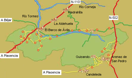 Localización del Parque Regional de Sierra de Gredos